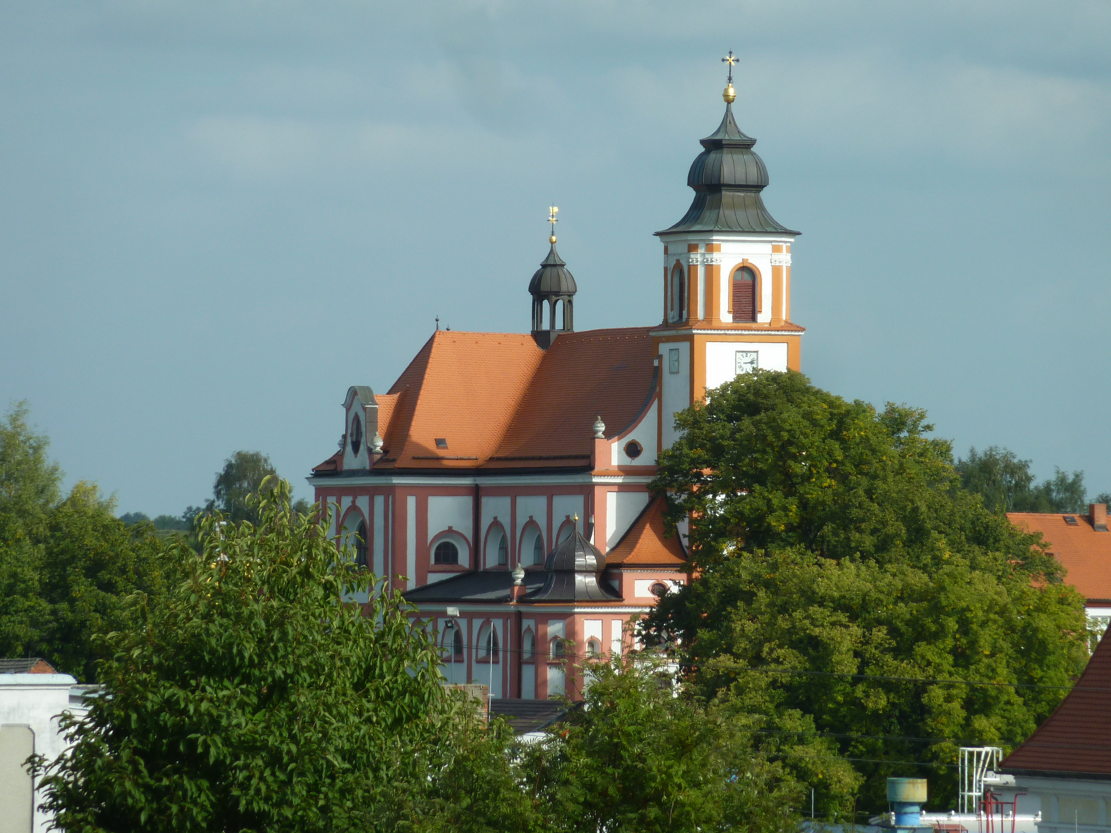 Kostel sv. Stanislava, Bolatice